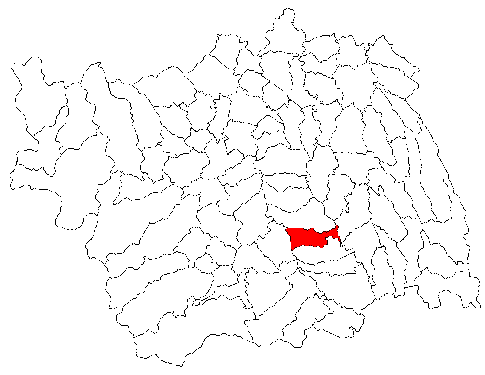 Categorie:Hărţi ale judeţului Bacău